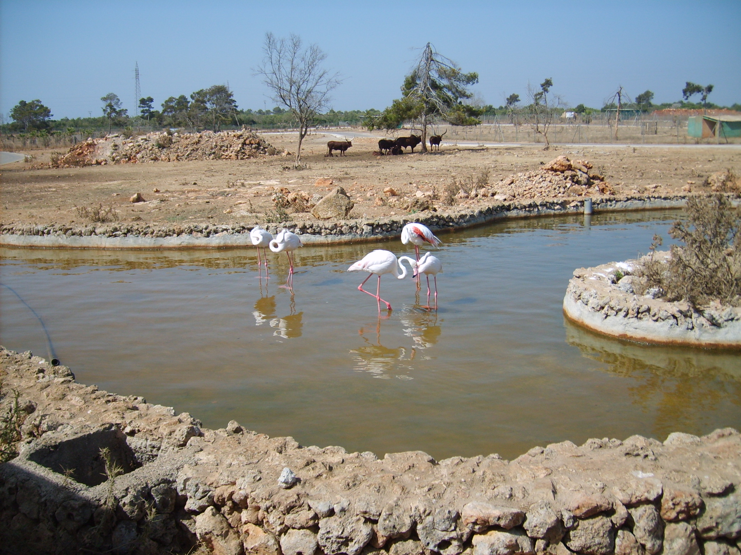 Safaripark Sa Coma auf Mollorca